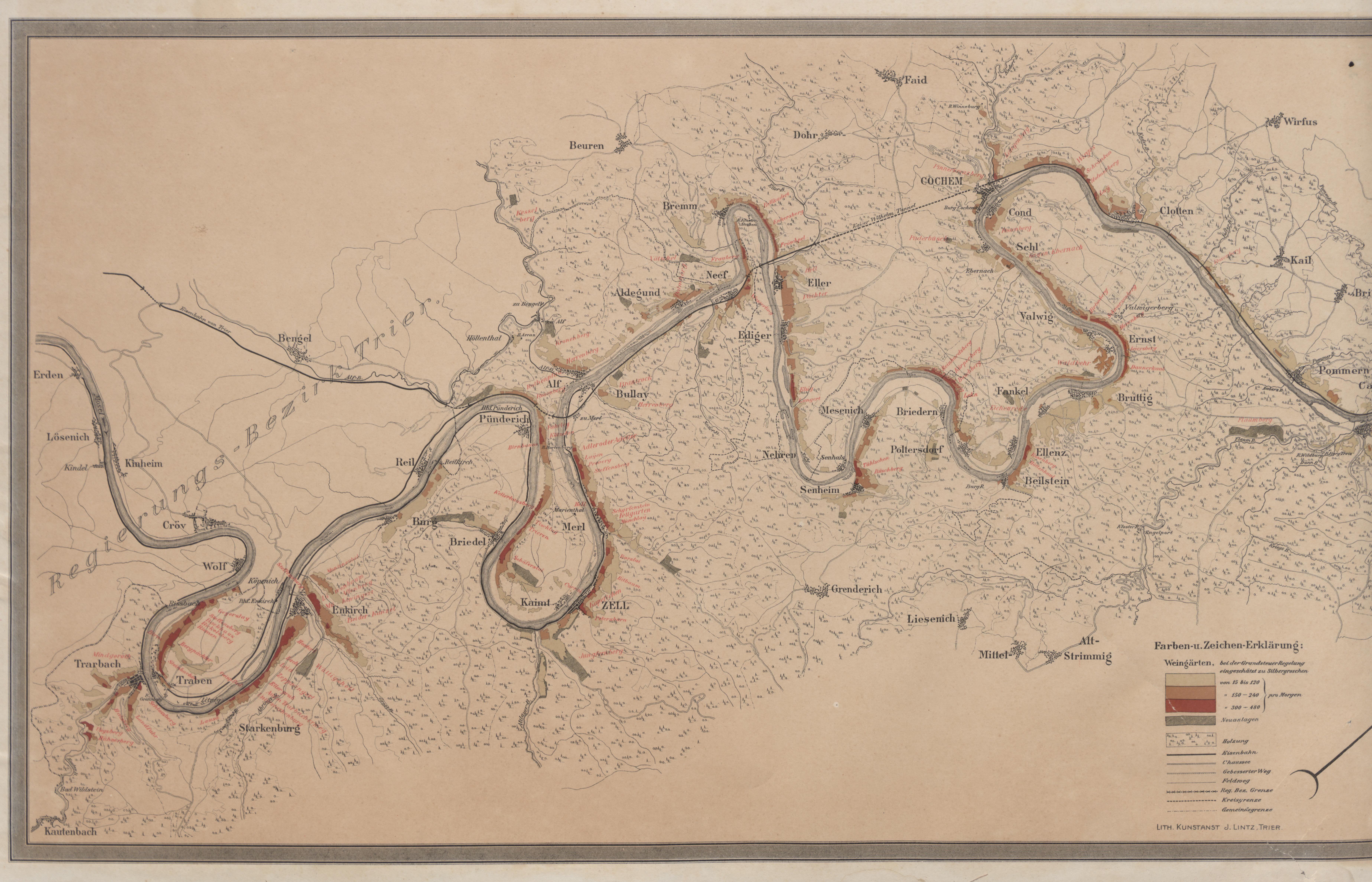 Koblenz : 1908; [Electronic ed.] Koblenz : Landesbibliothekszentrum Rheinland-Pfalz, 2010.